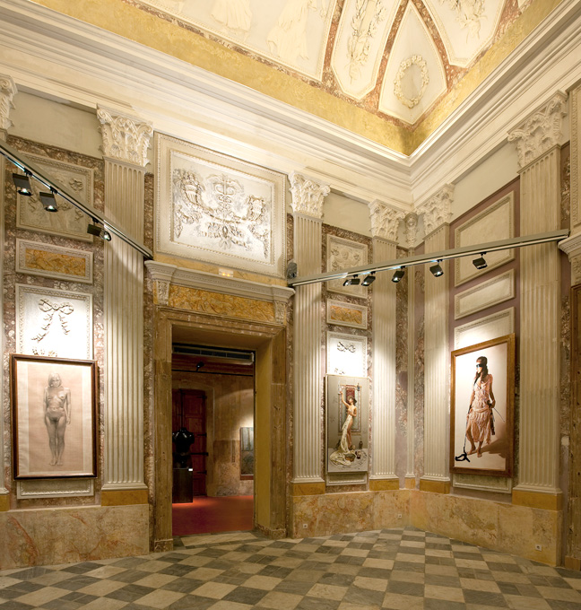 foto del museo meam